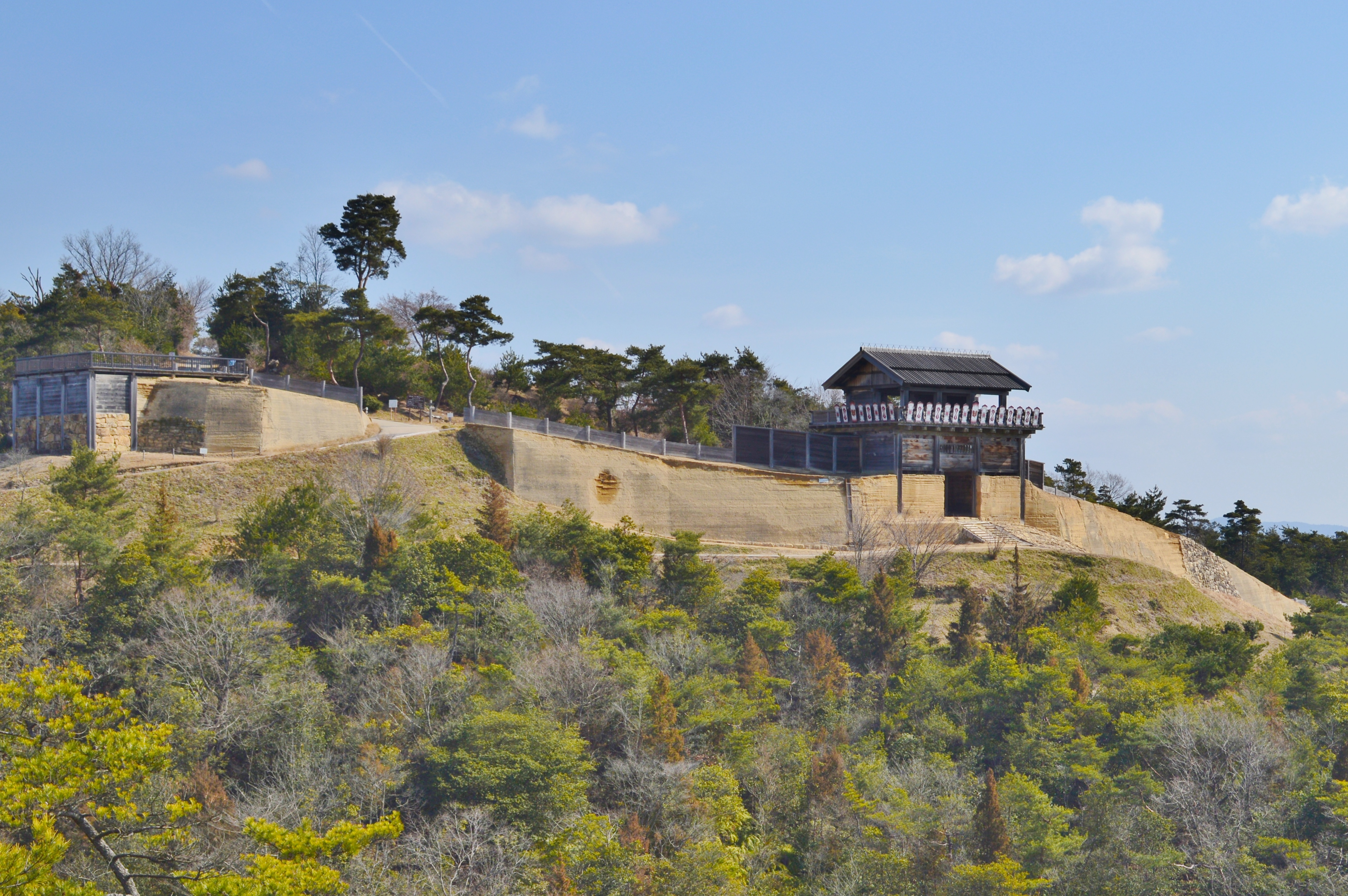 鬼ノ城 遠景